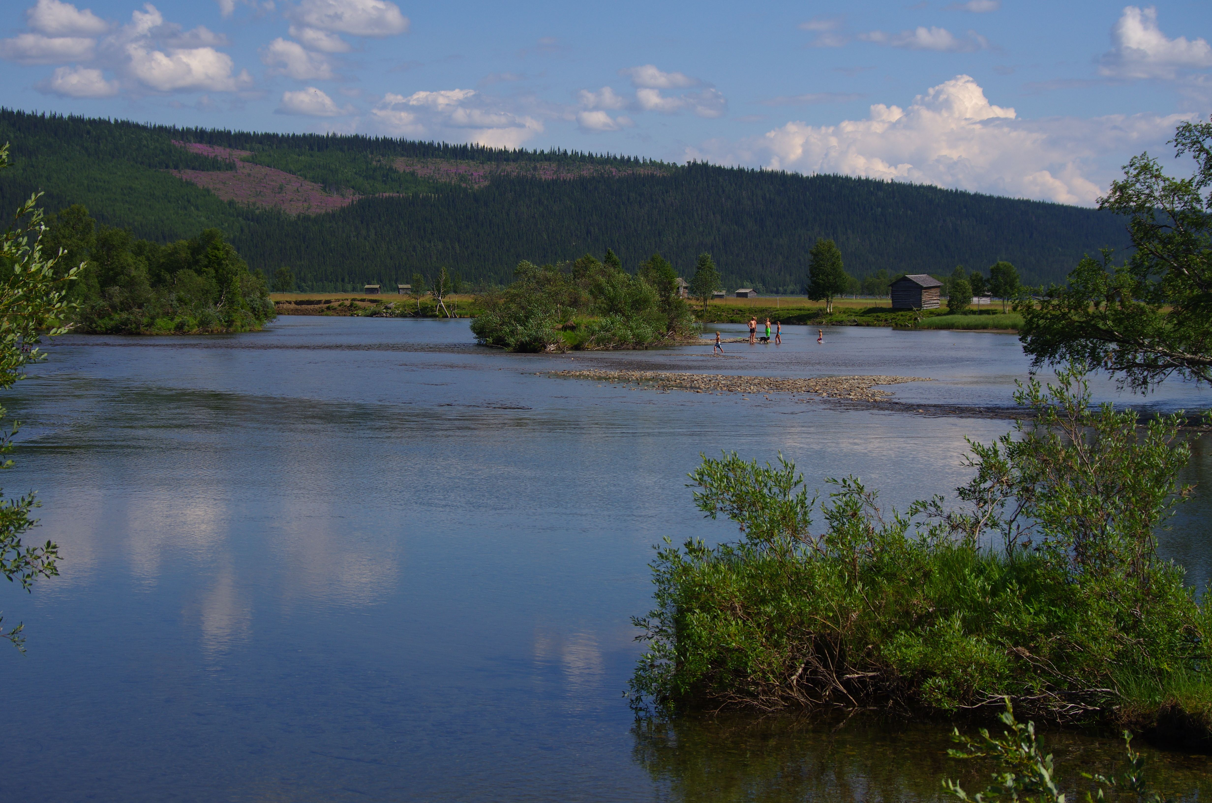 Tjulån i Ammarnäs i Sorsele kommun i Lappland i Sverige. Tjulån är ett biflöde till Vindelälven.